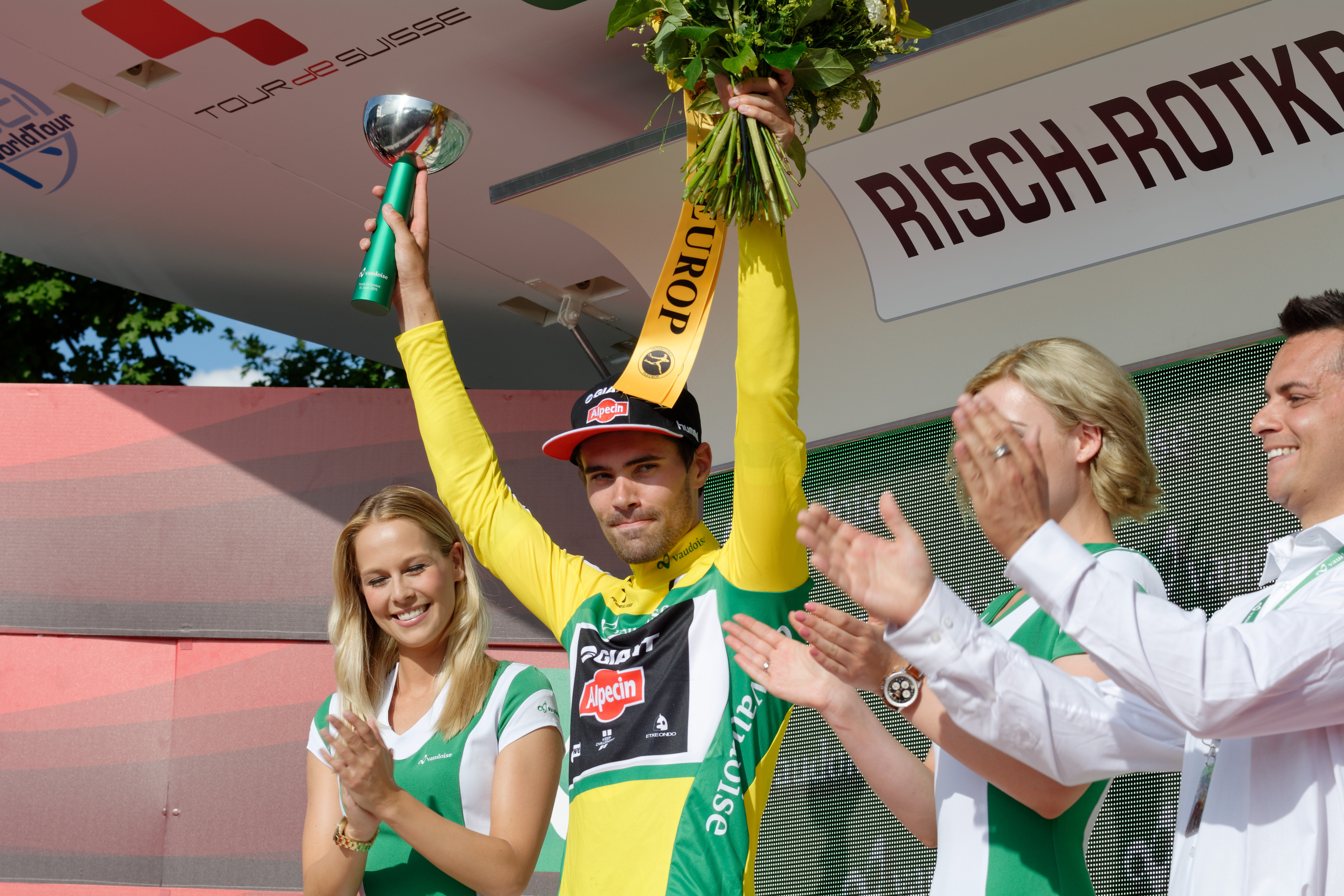 D71_9715_DxO